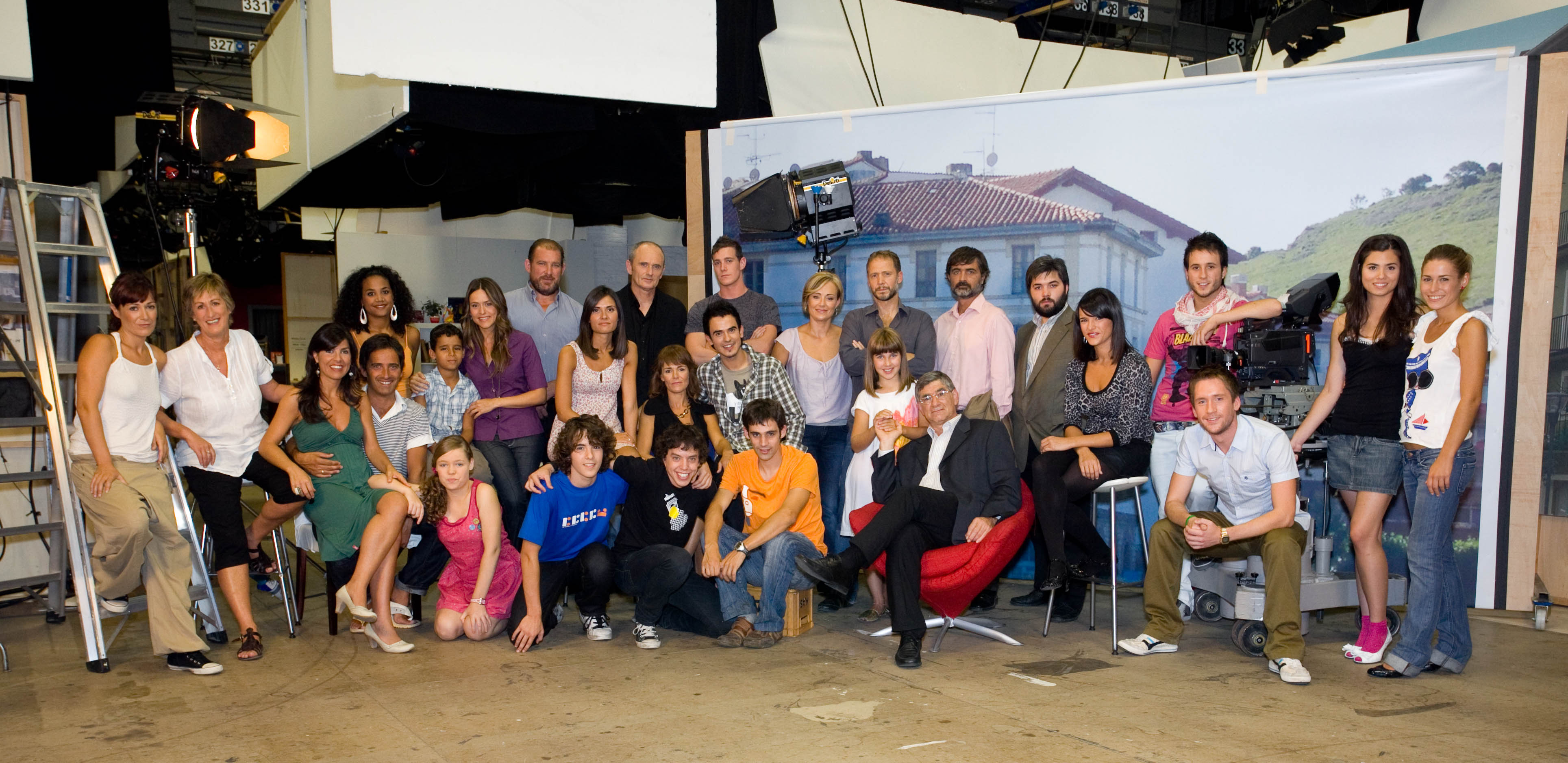 Elenco actoral actual de la serie.